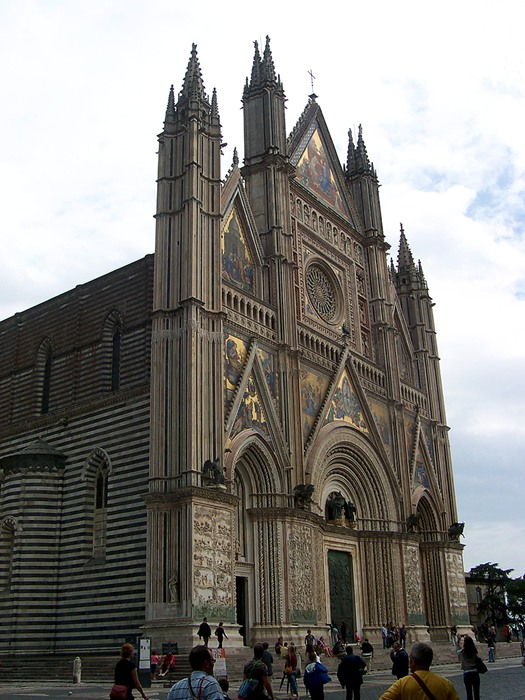 Orvieto - Duomo